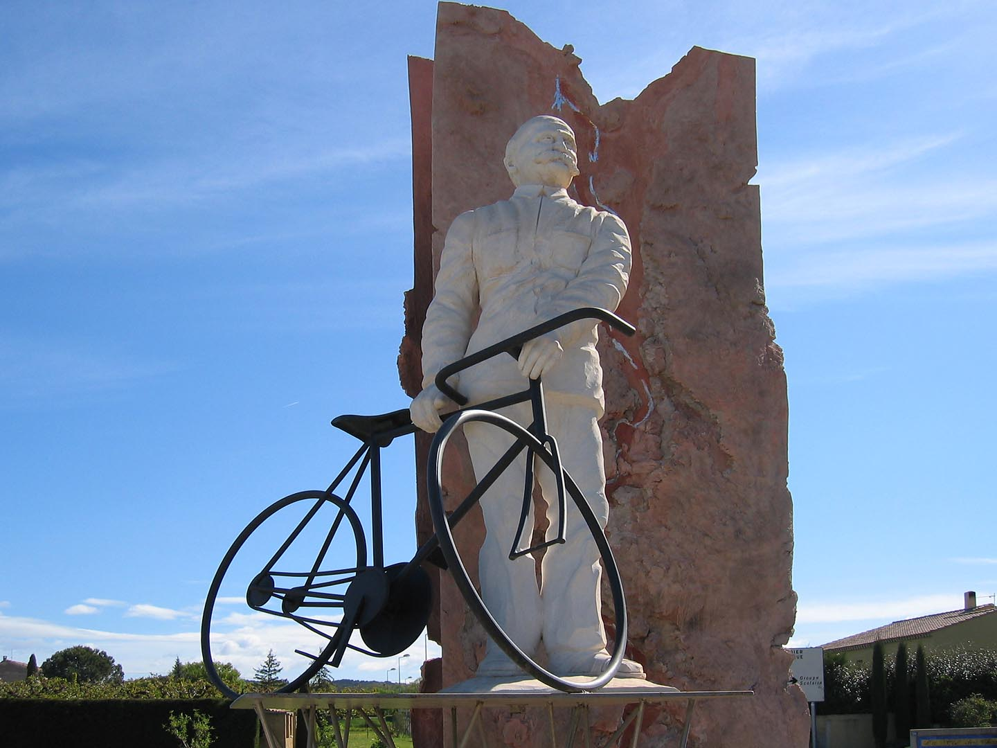 Pernes-les-Fonaines Monument à Vélocio